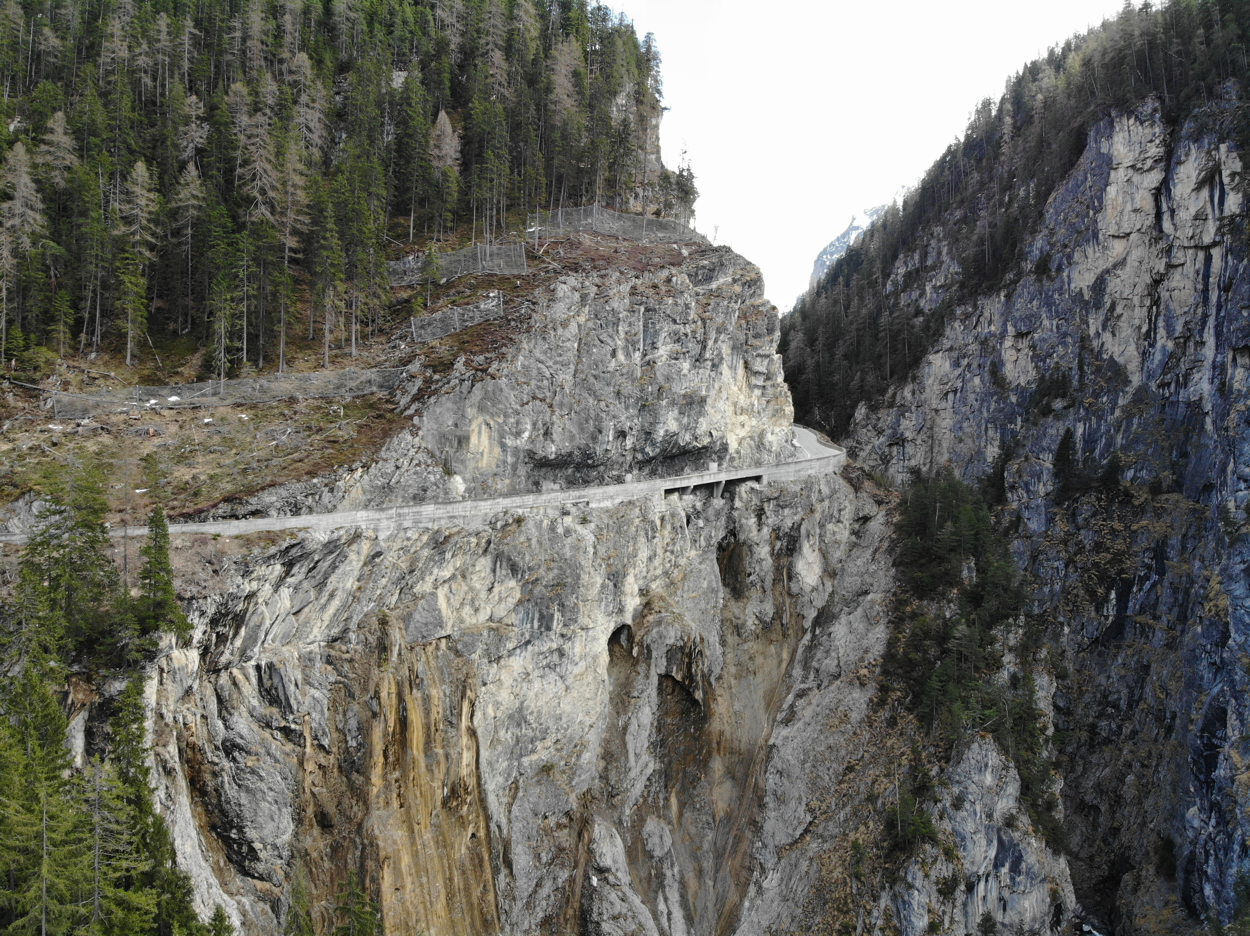 Bergünerstein: Felsenwerk Bergünerstein links A 7667: 1xLmg, Sprengobjekt Mxxxx